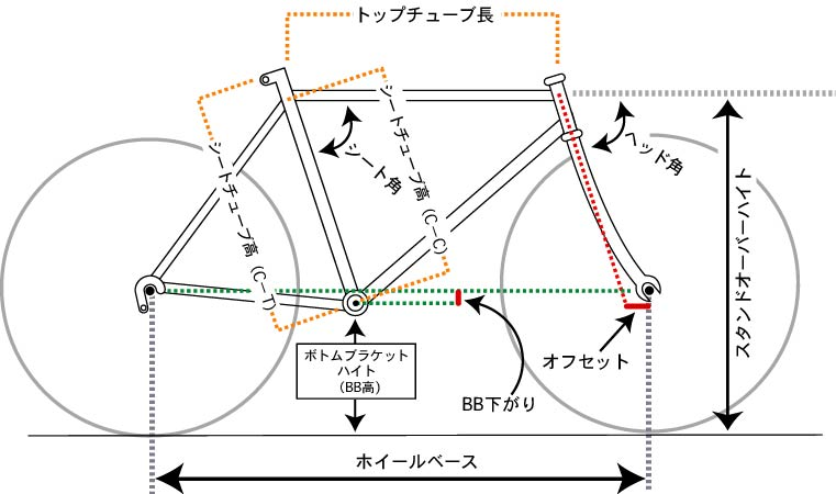 bike frame(ja)2